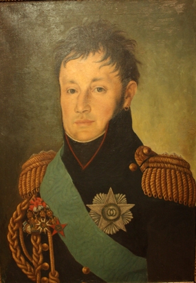 Giuseppe Lechi (1767-1836)